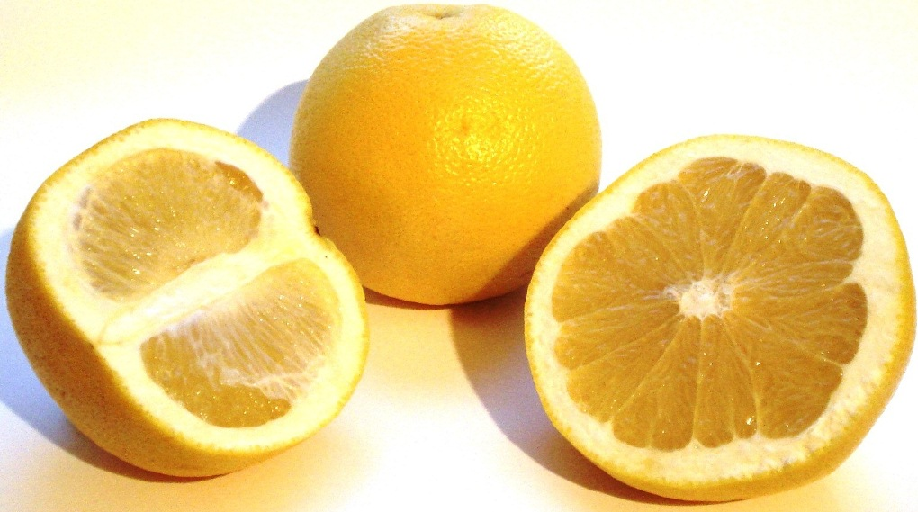 Citrus × aurantium - geschnitten - Weiße Grapefruite